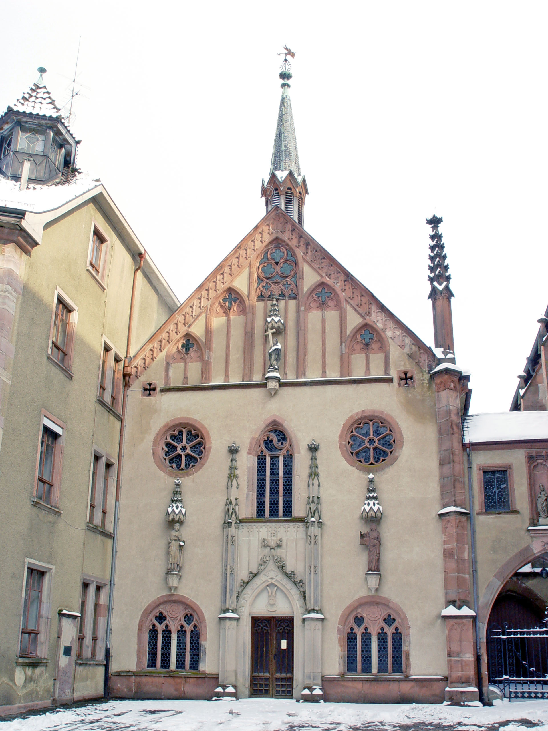 Kapell Lichtenthal